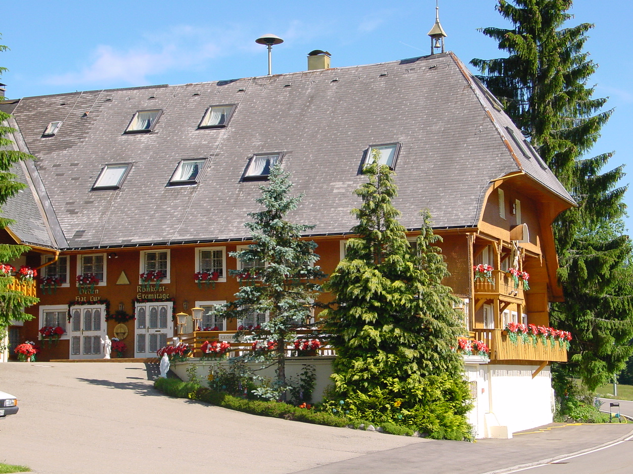 Hauptsitz von Fiat Lux in lbach